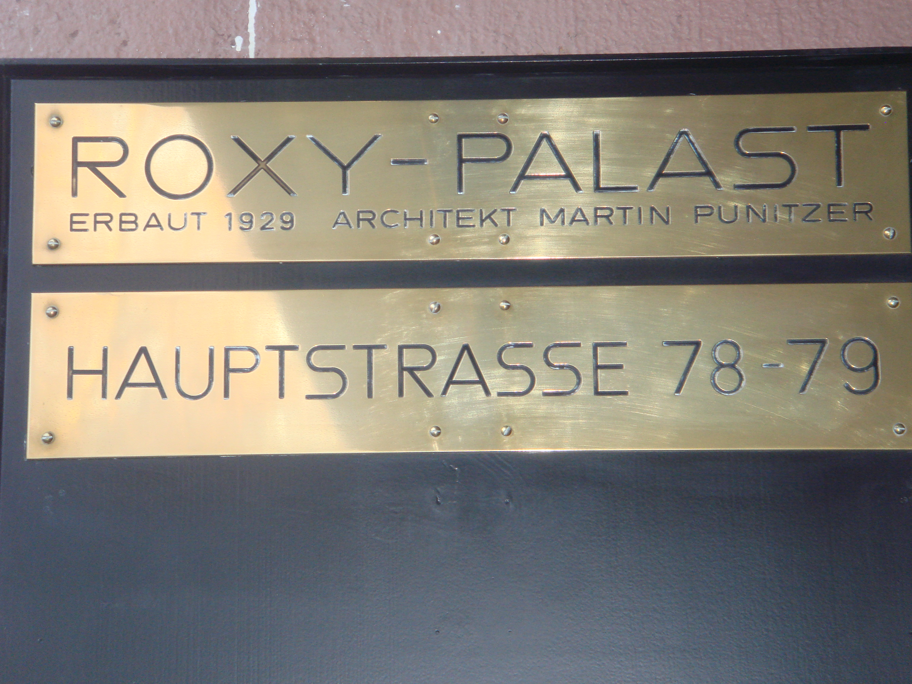 = Messingschild am Seiteneingang des Roxy-Palastes, Hauptstr. 78/79, Berlin-Friedenau Urheber= --Detlef ‹ Emmridet › 12:14, 7. Dez. 2009 (CET)